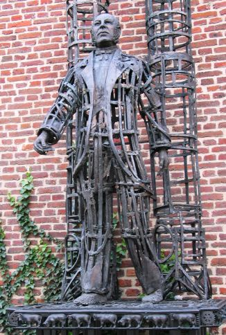 Dokter Willems - eigen foto